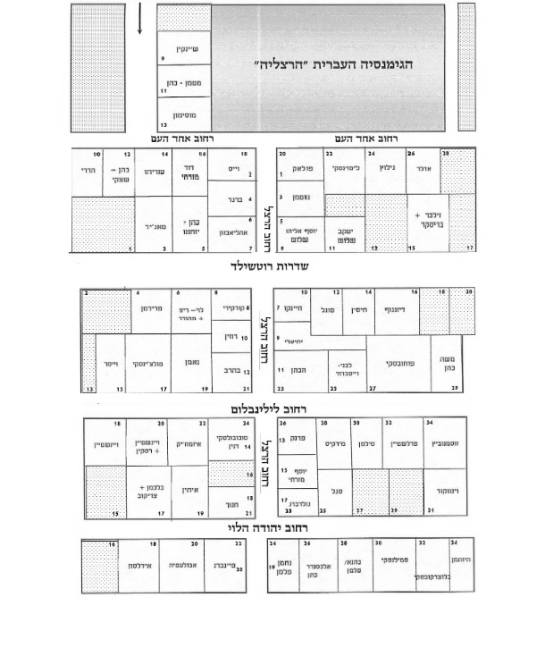 תוכנית חלוקת הבתים באחוזת בית